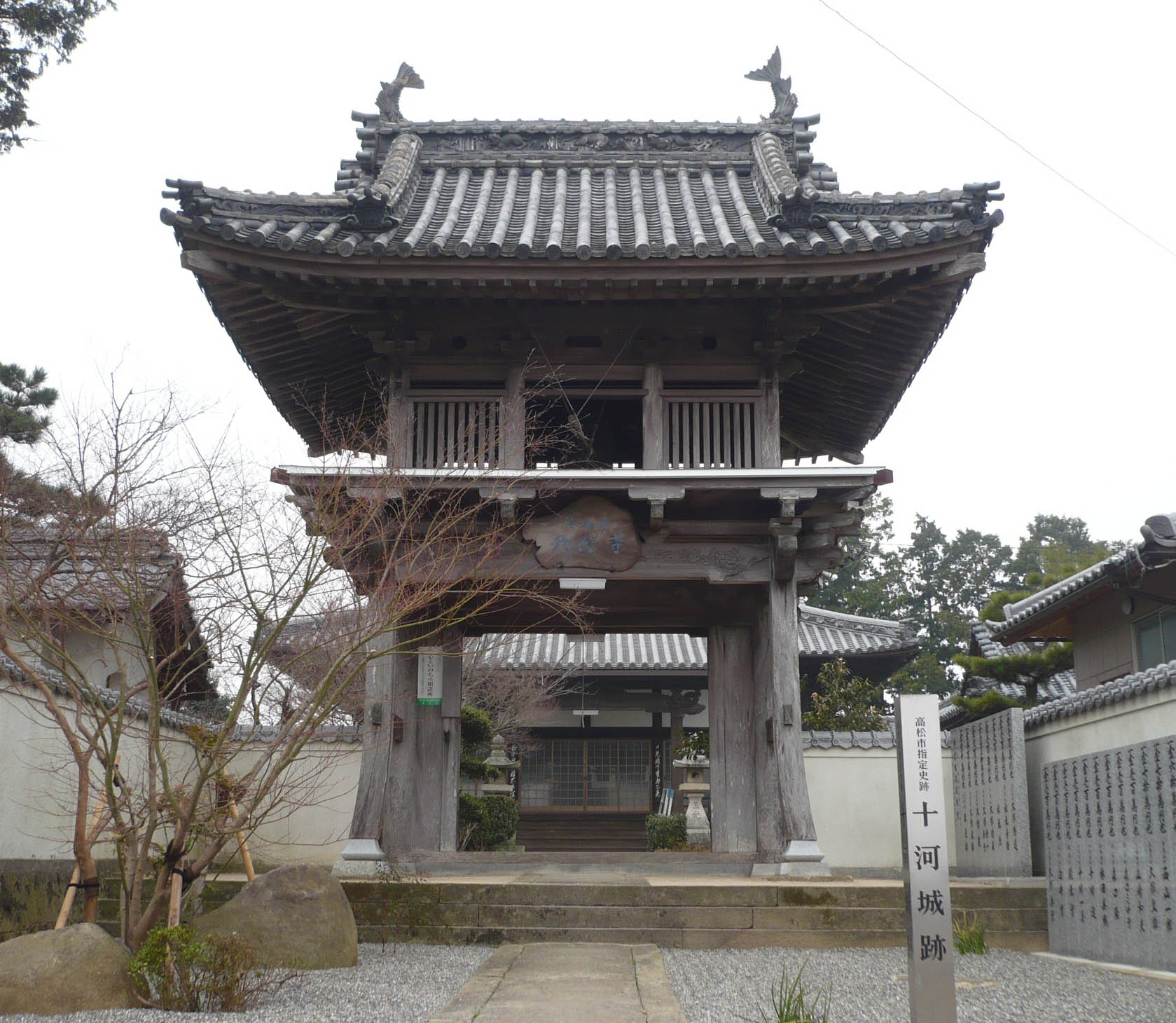 山門